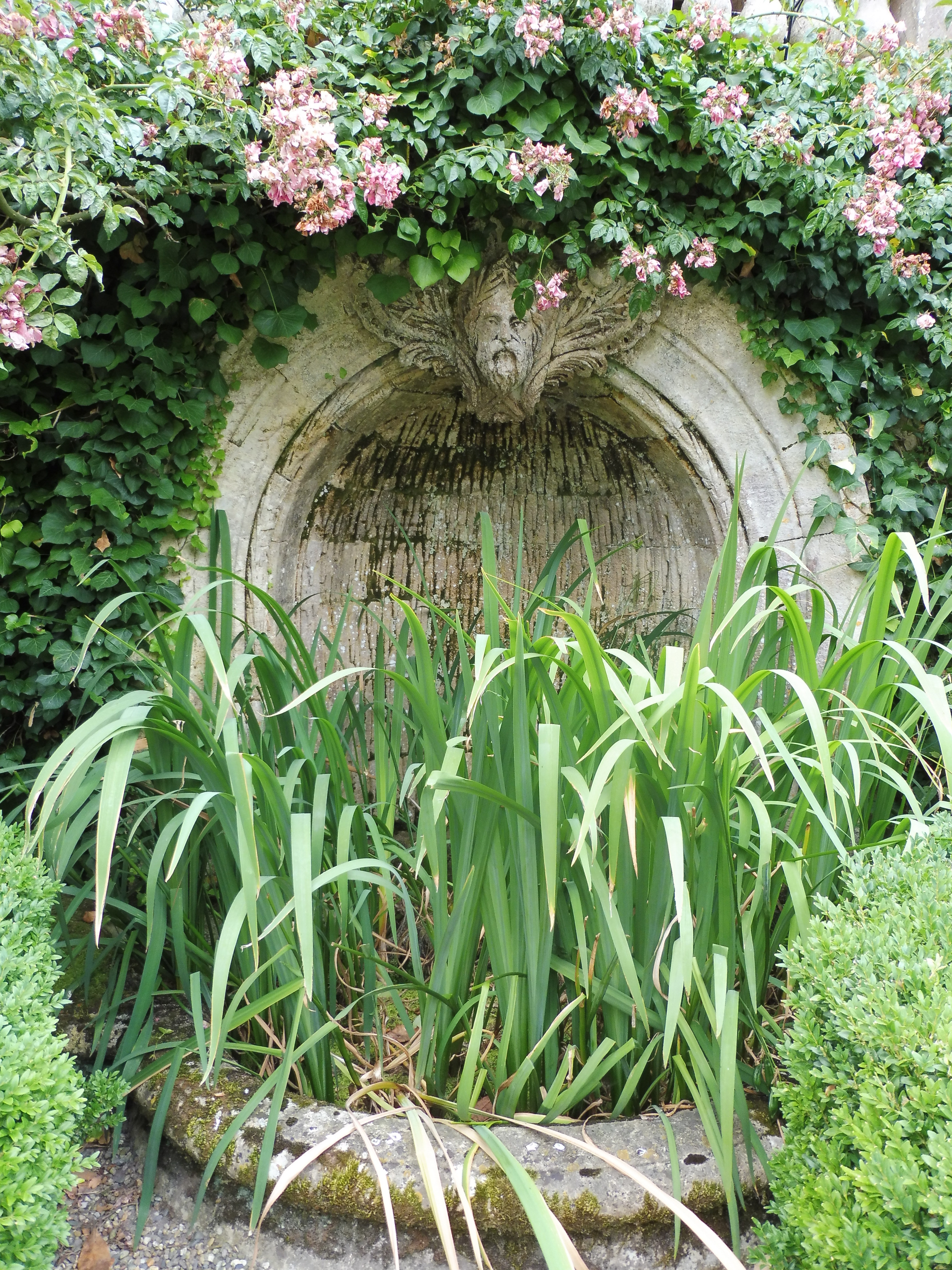 Fontaine en contrebas de l'escalier nord du château Malleret à Cadaujac-33.